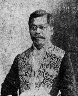 重岡薫五郎